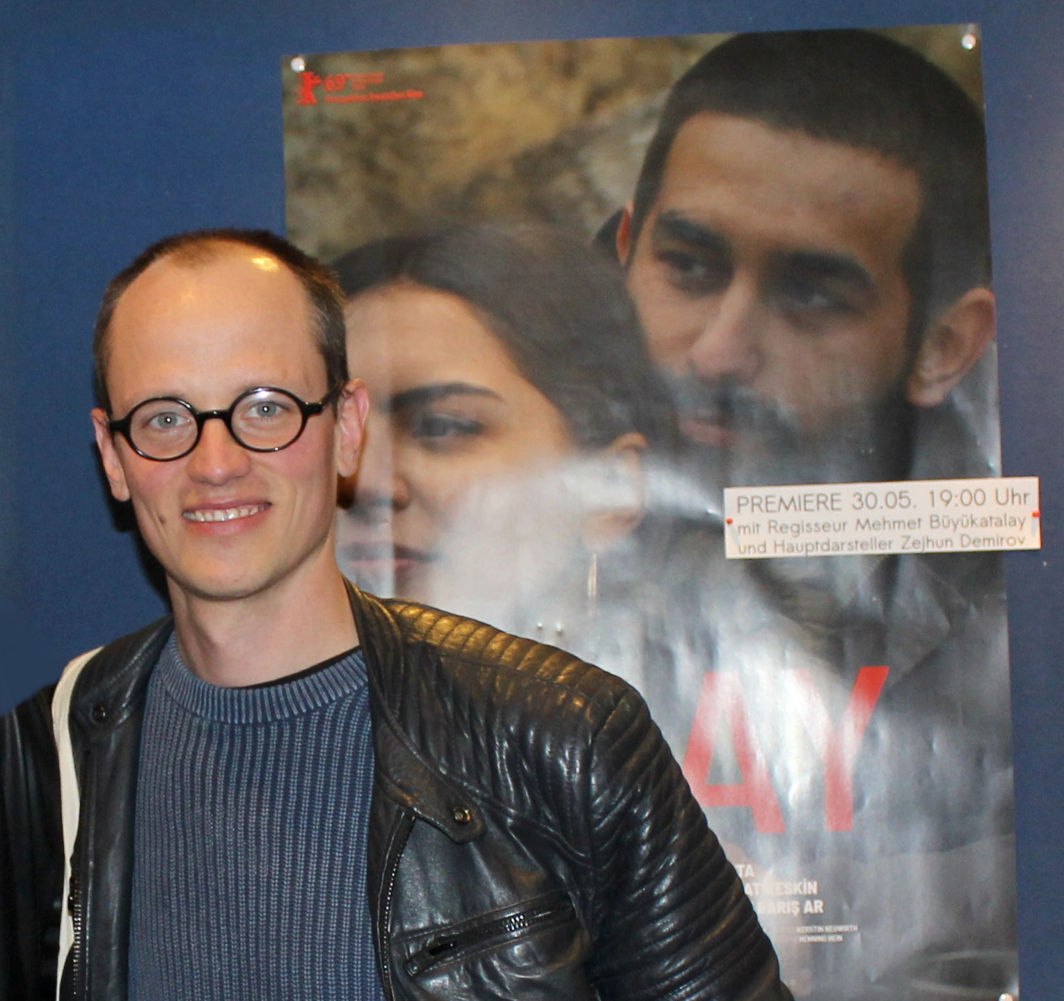 Claus Reichel geboren 1986 in Friedberg/Bayern. Studium Regionalstudien Lateinamerika/Sozialwissenschaften (B.A.) an der Universität Köln. Abschlussarbeit über die Arbeit des bolivianischen Filmemachers Jorge Sanjinés. Nach einem Aufenthalt auf der Bont's International Clown School Menorca seit 2014 Aufnahme-, Produktions- und Herstellungsleitung bei internationalen Kinospielfilmprojekten und eine befristete Tätigkeit in der Projektorganisation der Kunsthochschule für Medien Köln. 2016 gründete Claus Reichel gemeinsam mit Bastian Klügel und Mehmet Akif Büyükatalay die filmfaust Filmproduktion Köln. Claus Reichel arbeitet als freier Produzent für Spiel-, Dokumentar- und Experimentalfilm sowie als executive producer. Er ist Mitglied im Filmbüro NW. (Quelle: Aufnahme aus dem Metropol-Filmkunstkino Düsseldorf 2019.